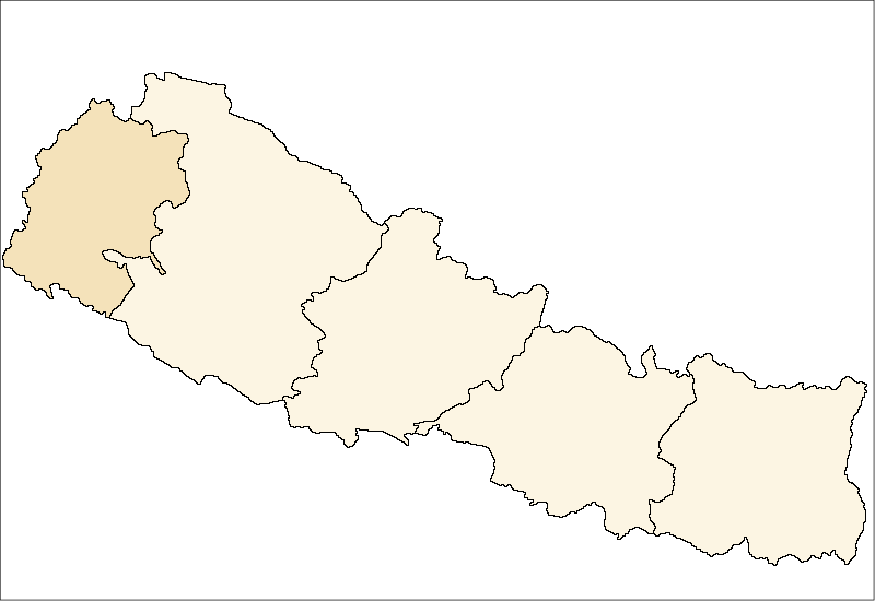 FrenchCarte de localisation de larégion de développement Extrême-Ouest(wp-FR),au Népal (wp-FR).EnglishLocation map ofFar West Region in Nepal (wp-EN).